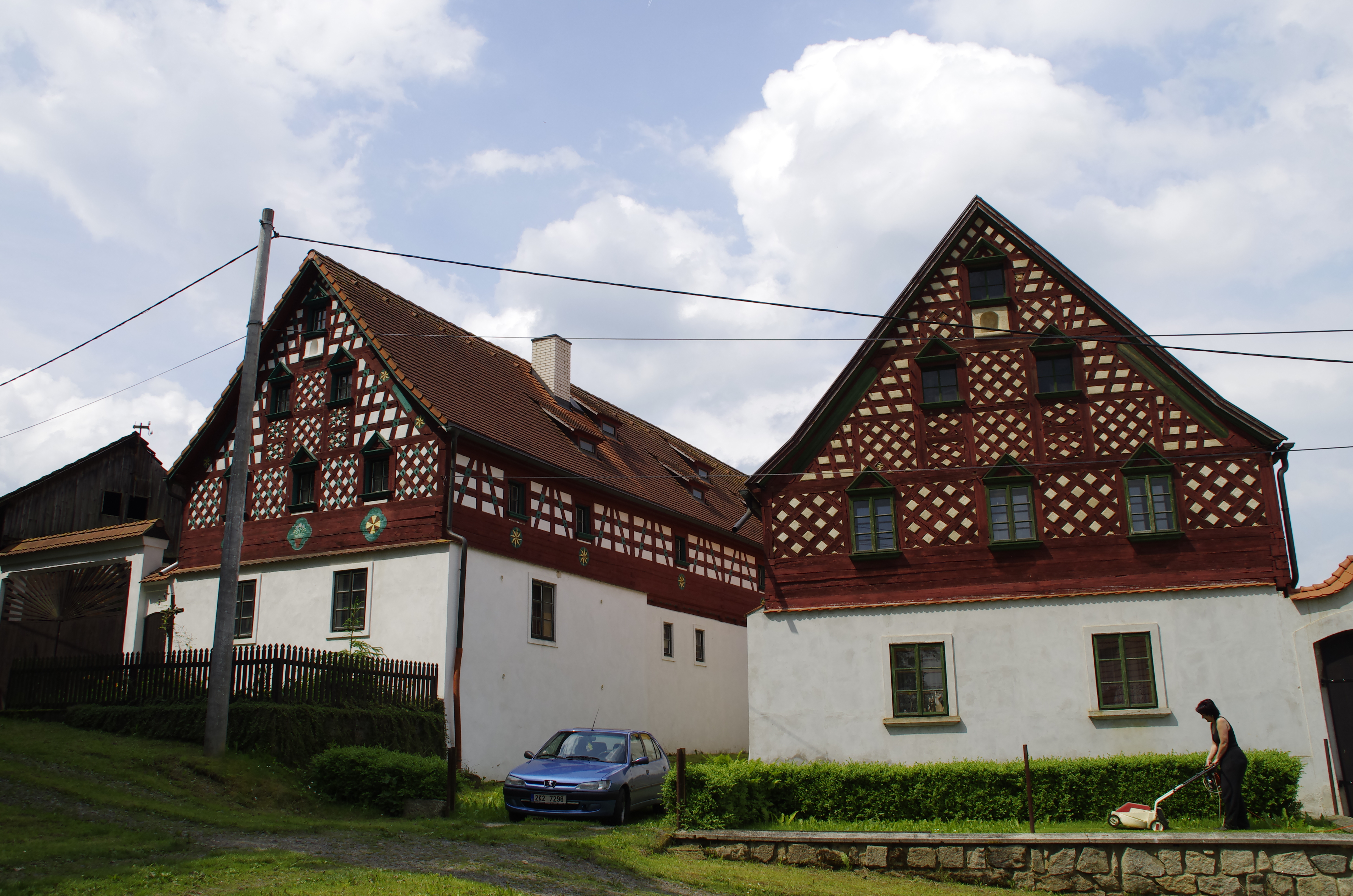 Dolní Lažany (Lipová) - památkově chráněné domy čp. 3 a 5 This image was acquired during the event Wikiměsto Mariánské Lázně.